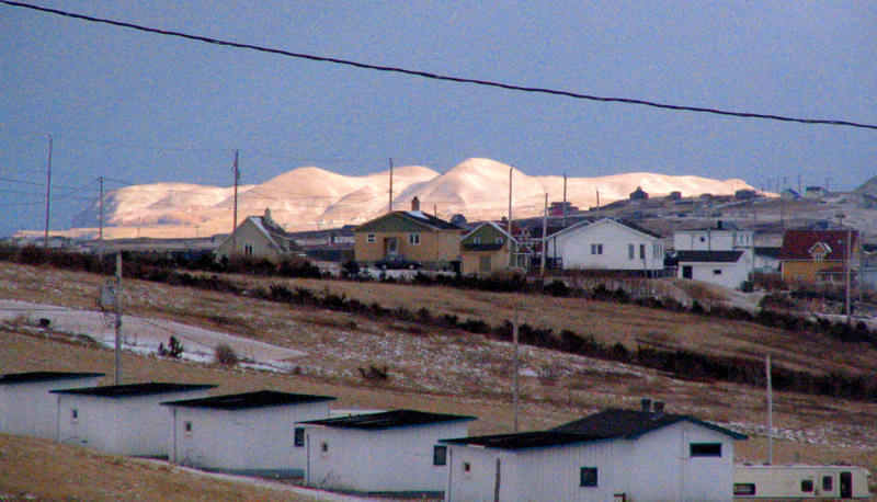 Vue de l'Île d'Entrée (Entree Island) enneigée et ensoleillée, depuis Bassin, sur l'île du Havre Aubert.